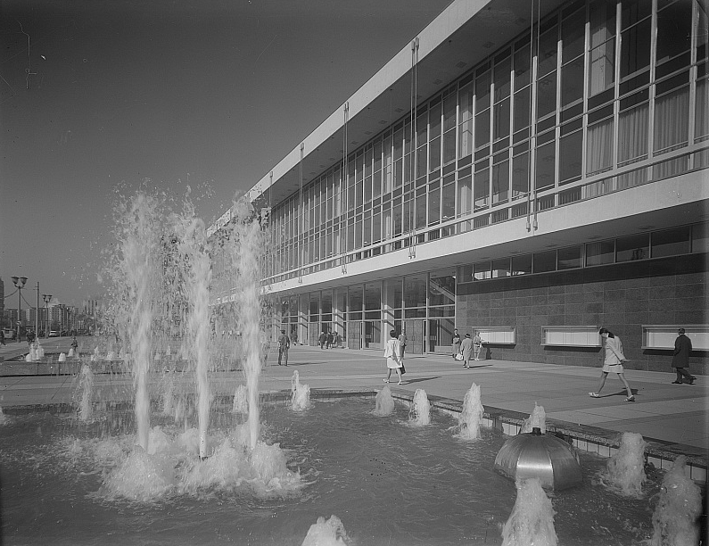 Original image description from the Deutsche Fotothek Dresden. Kulturpalast, Eingangsseite mit Springbrunnen